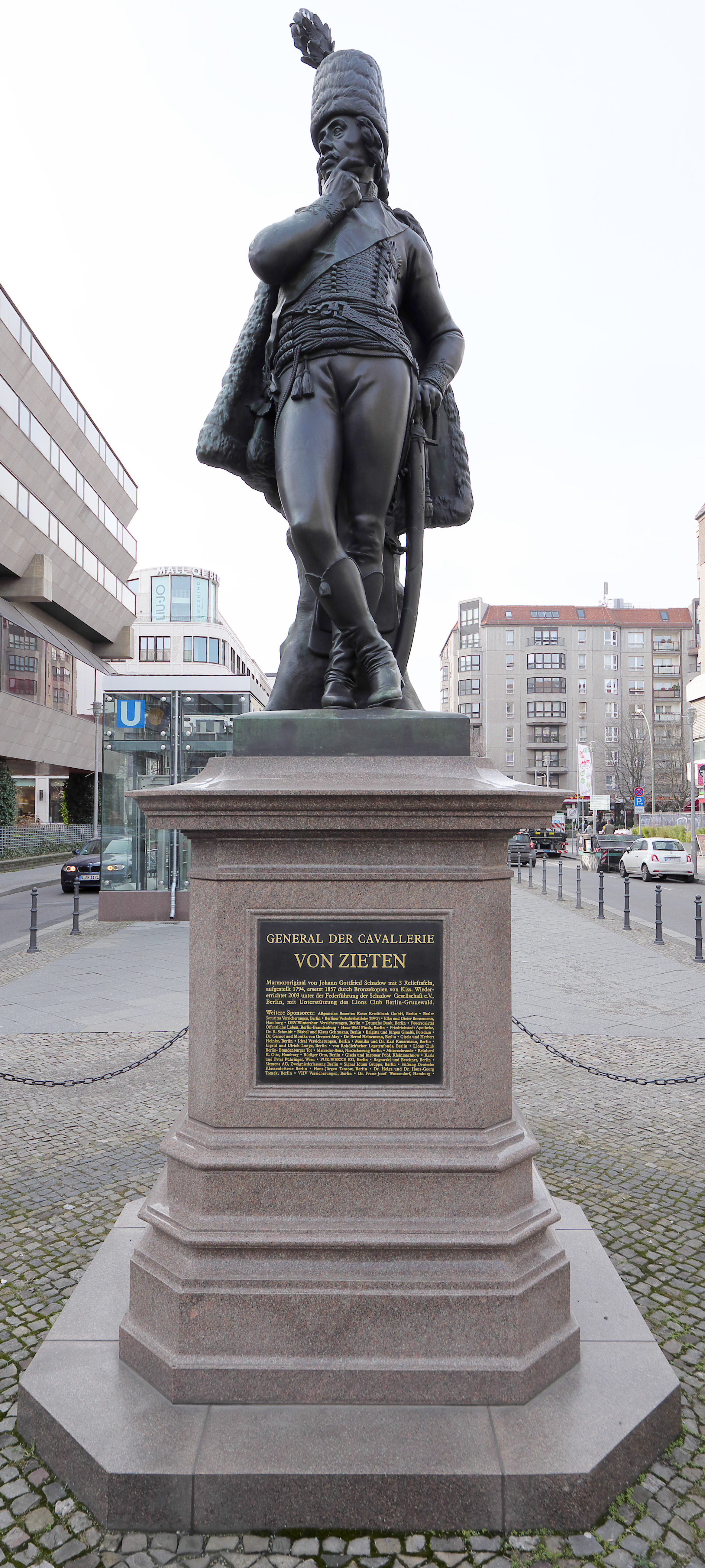 Bronzedenkmal von General von Zieten am Zietenplatz in Berlin-Mitte